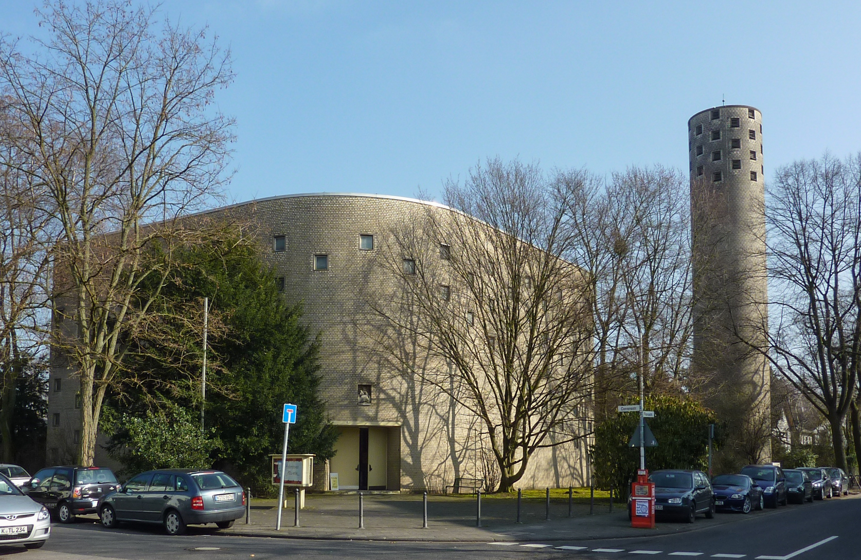 St. Hildegard in der Au, Köln-Nippes